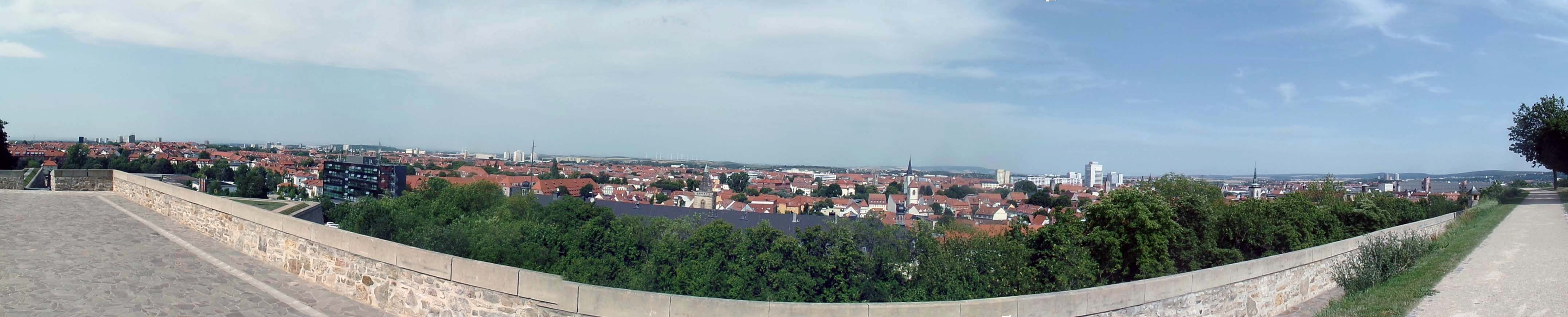 Erfurter Altstadt vom Petersberg